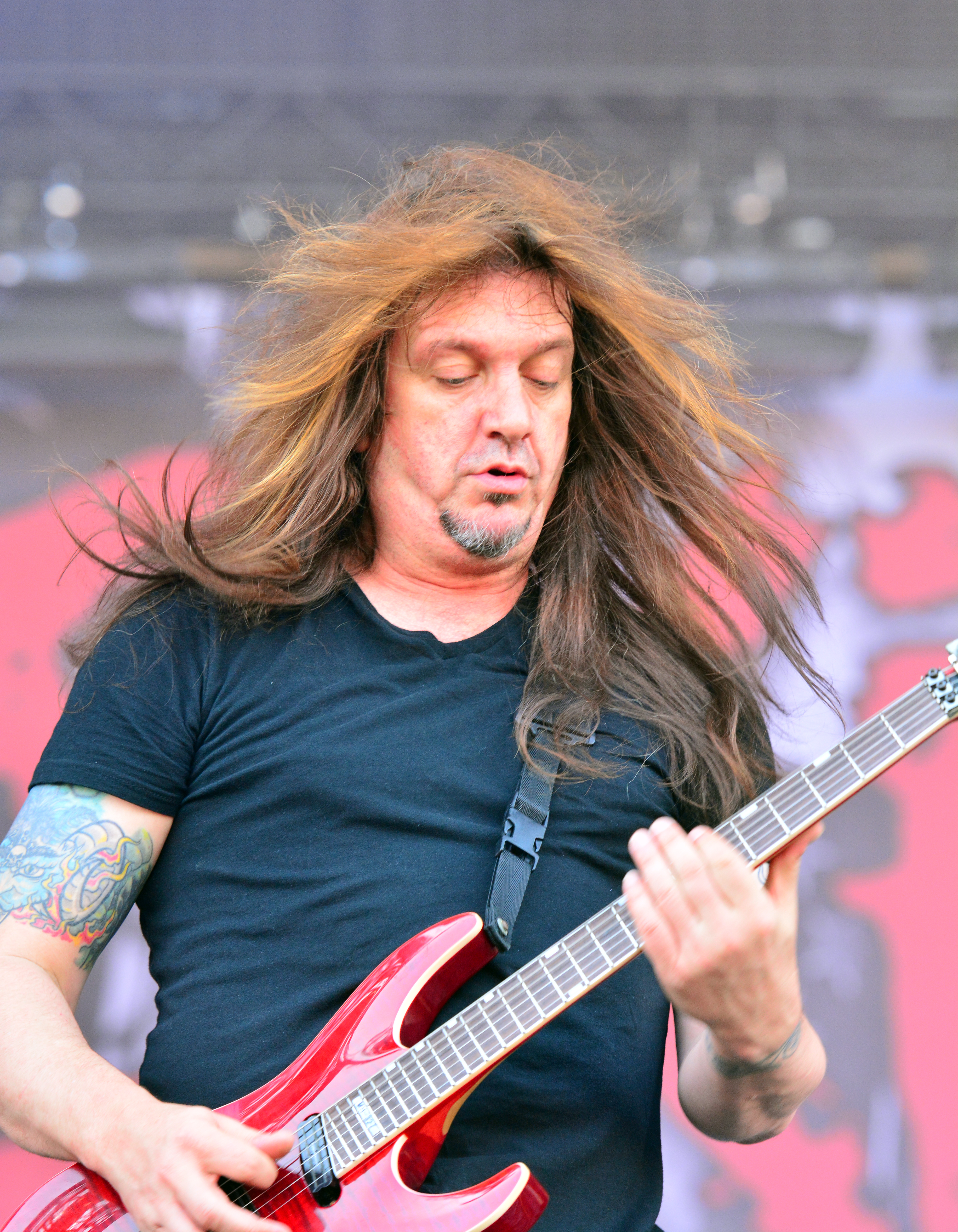 Dave Sabo von Skid Row beim Wacken Open Air 2014